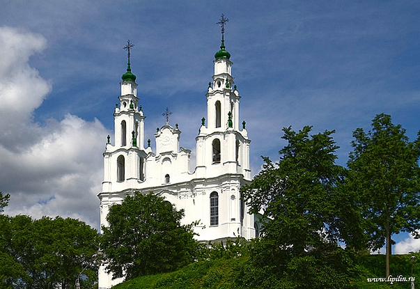 Полацк. Вежы сабора